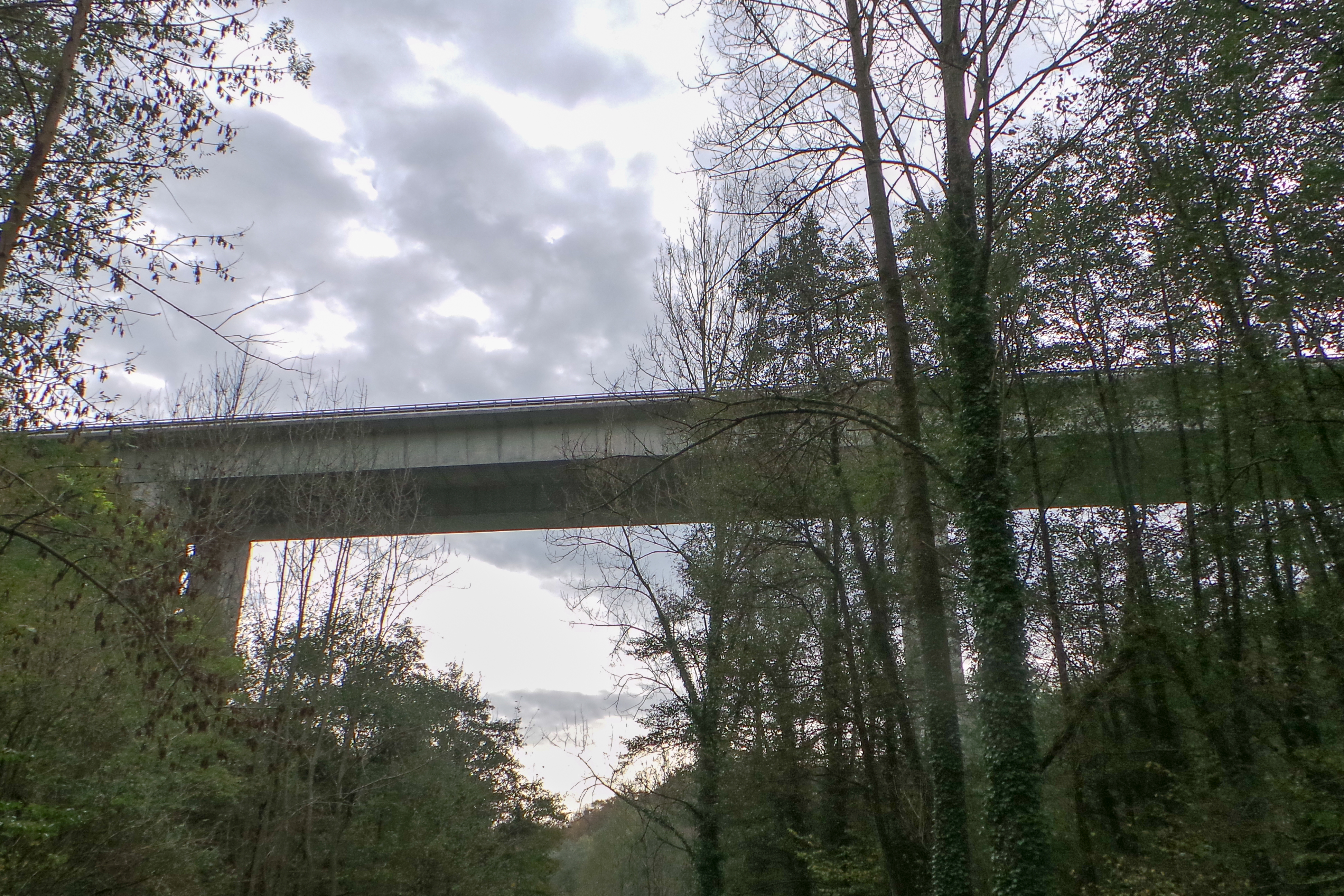 Viaduc de la Fure / Autoroure A48, Isére France